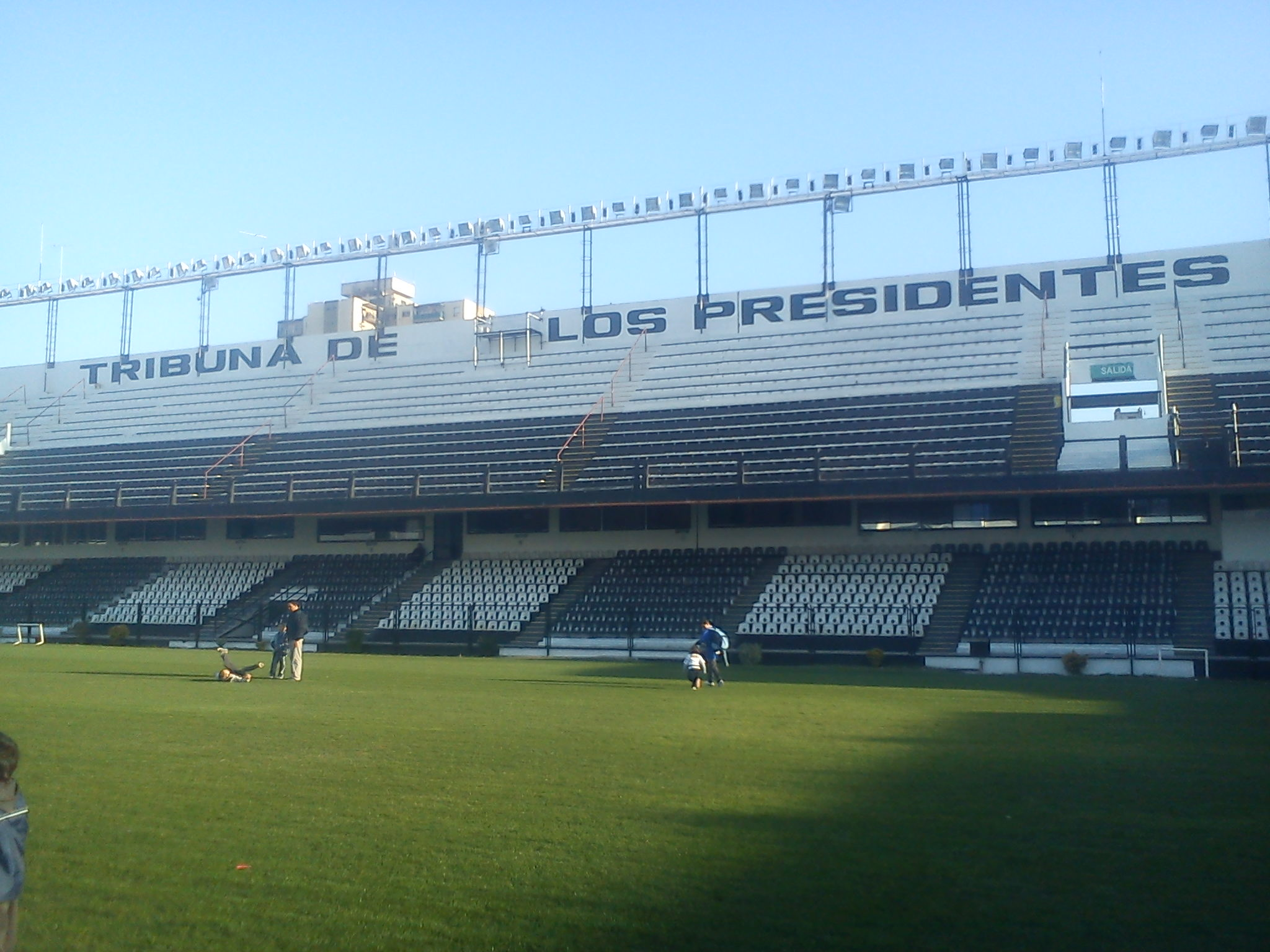 Foto tomada por mi de las plateas reformadas del Estadio Islas Malvinas